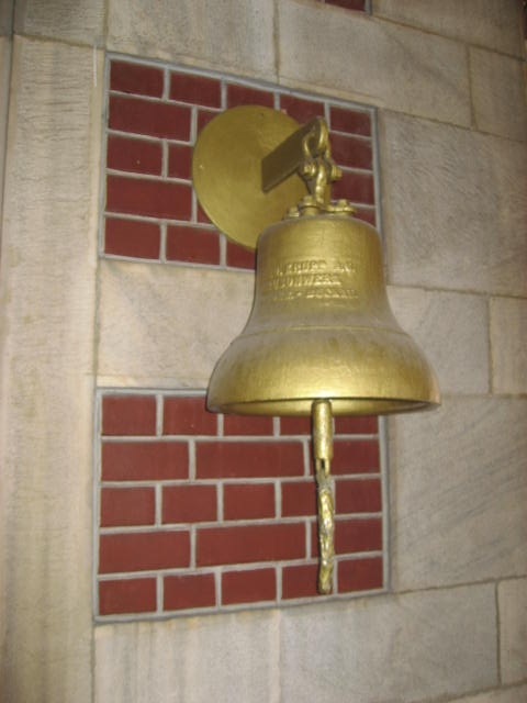 Istanbul Sirkeci Terminal